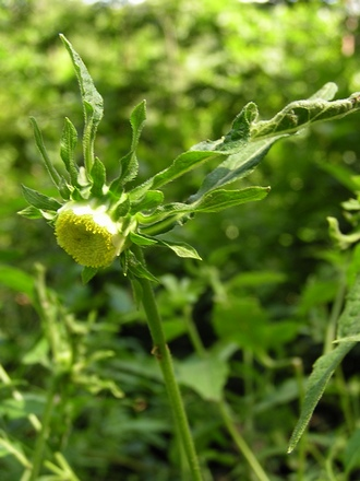 Körbchen von Carpesium cernuum; Südtirol